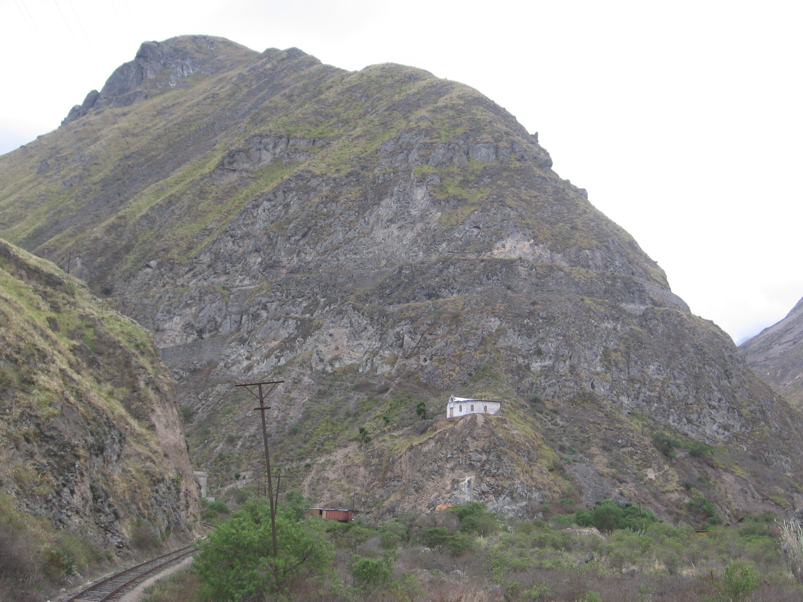 Devils Nose, near Alausi, Ecuador